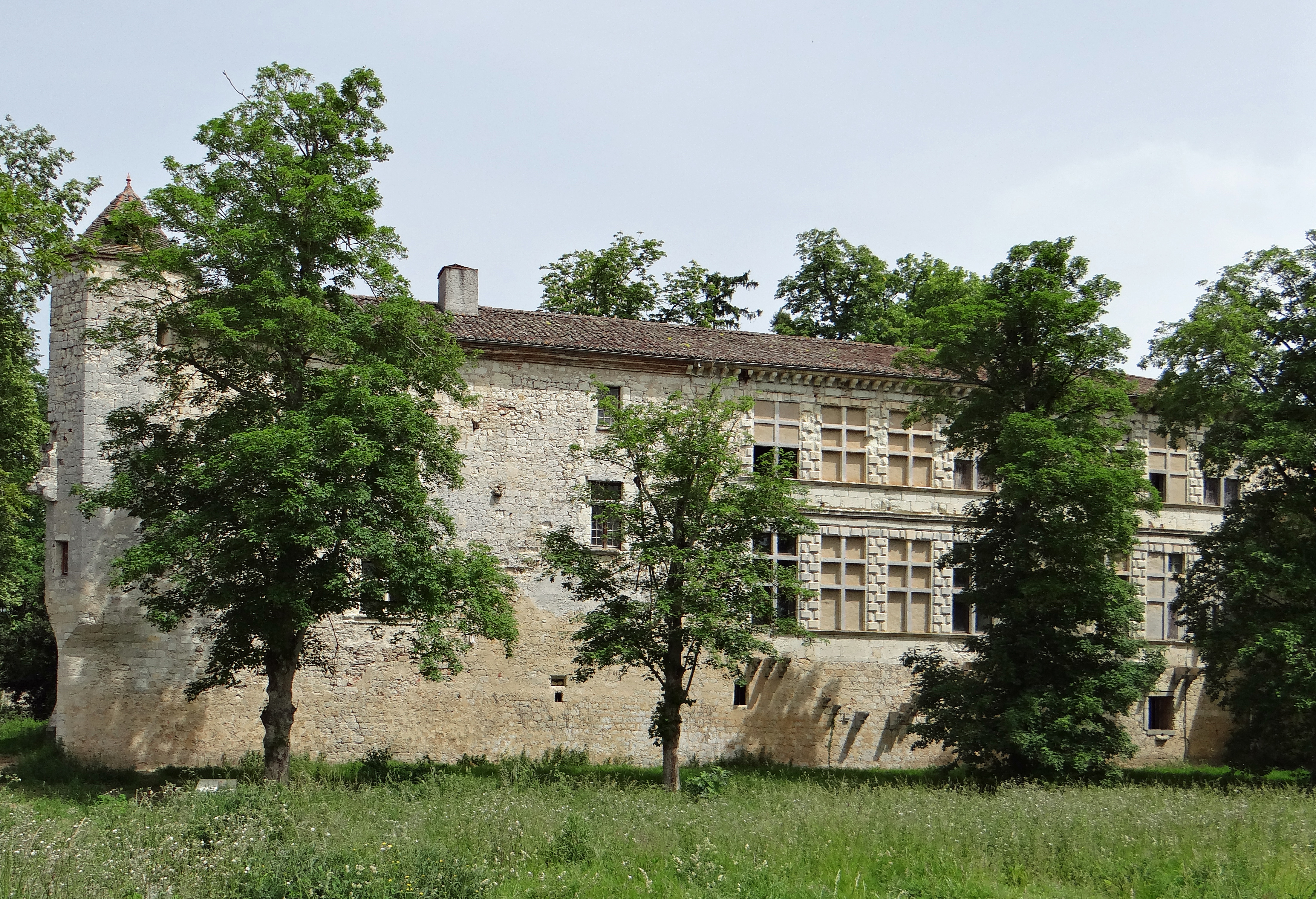 Château de Lafox - Façade sud